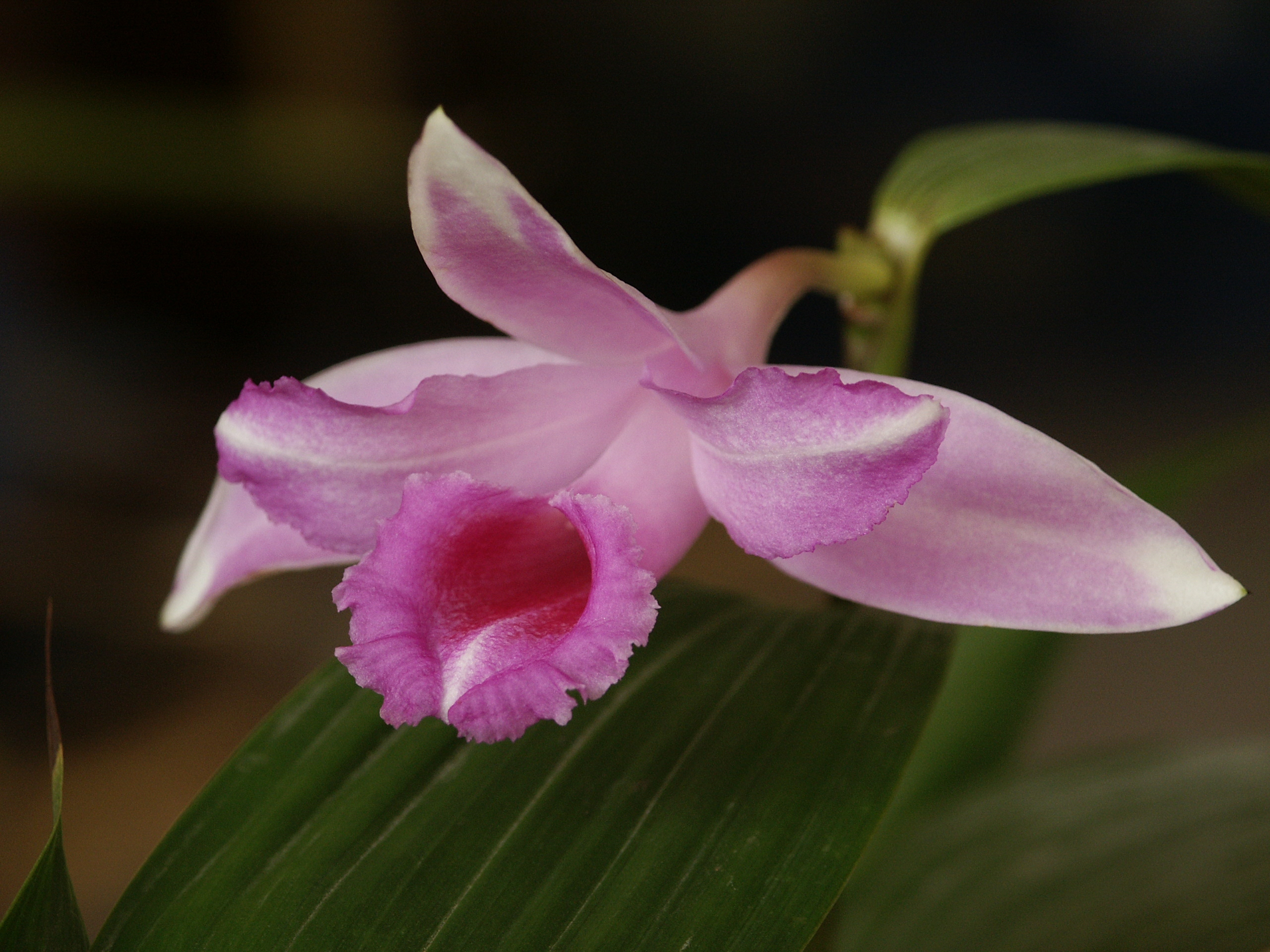 Sobralia decora, in cultivation